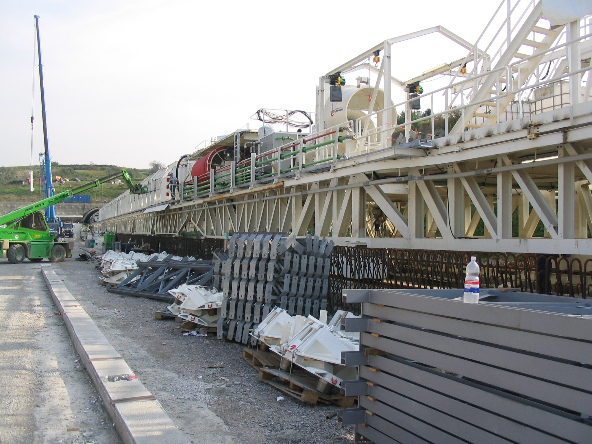 Selbst aufgenommen: Tunnelbohrmaschine beim Westportal des Wienerwaldtunnels